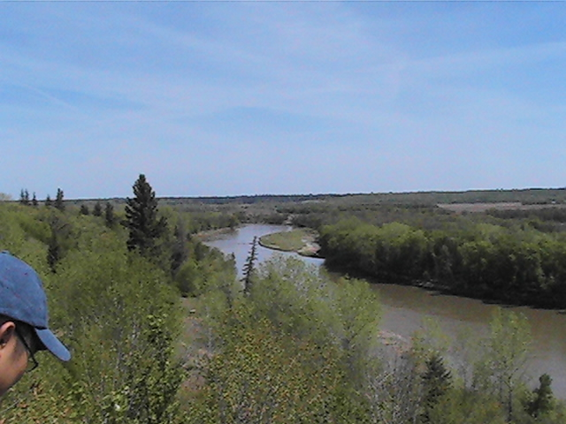 阿希尼伯恩河,攝於Spirit sand,manitoba,canada